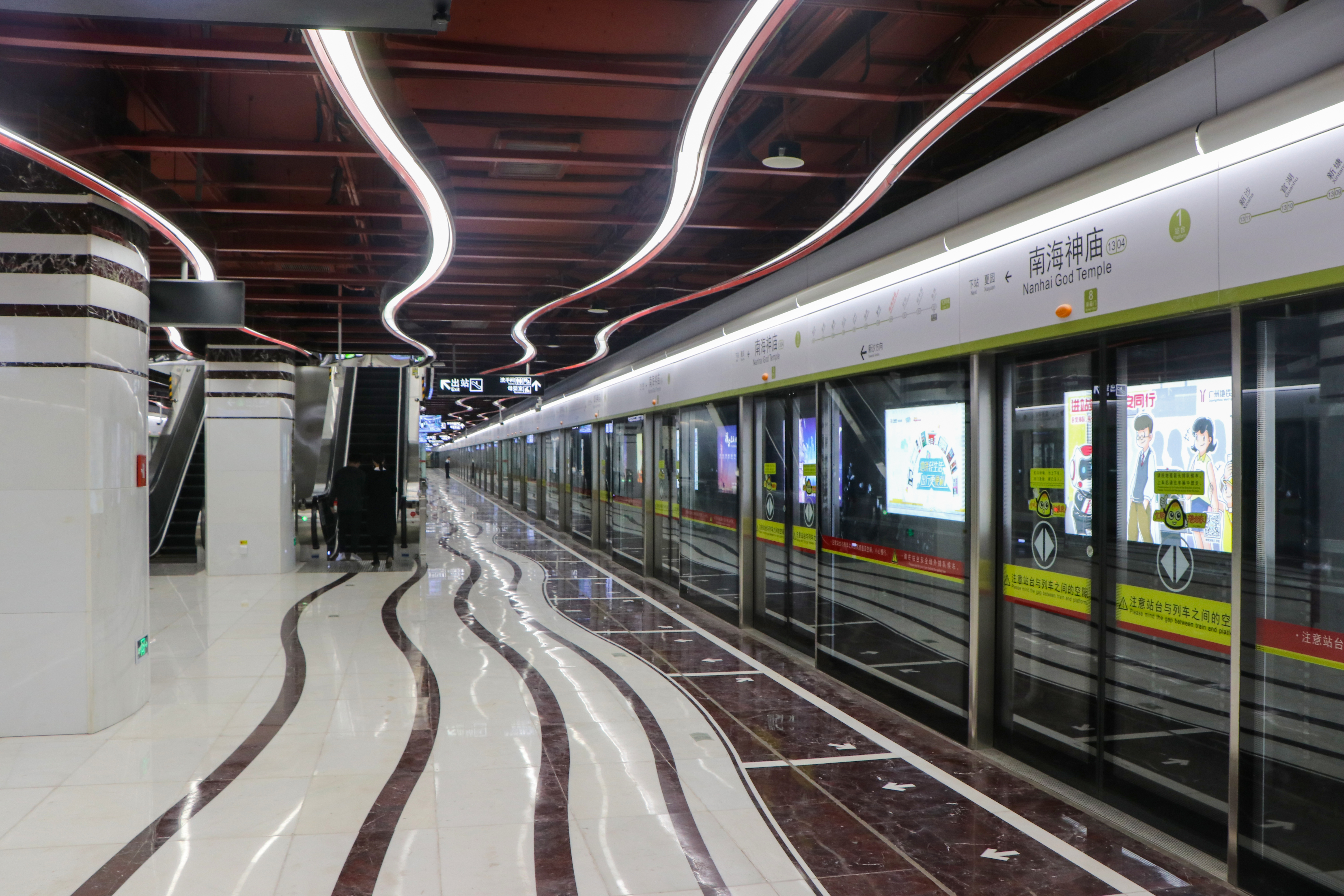 广州地铁南海神庙站